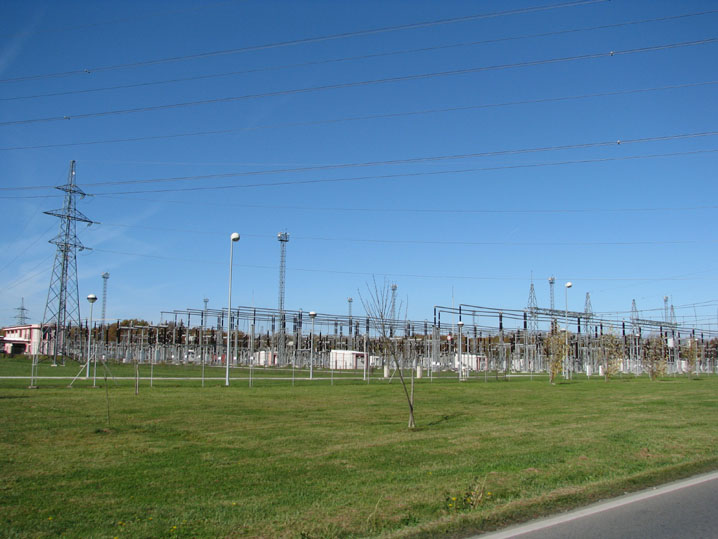 Žerjavinec, Zagreb - trafostanica